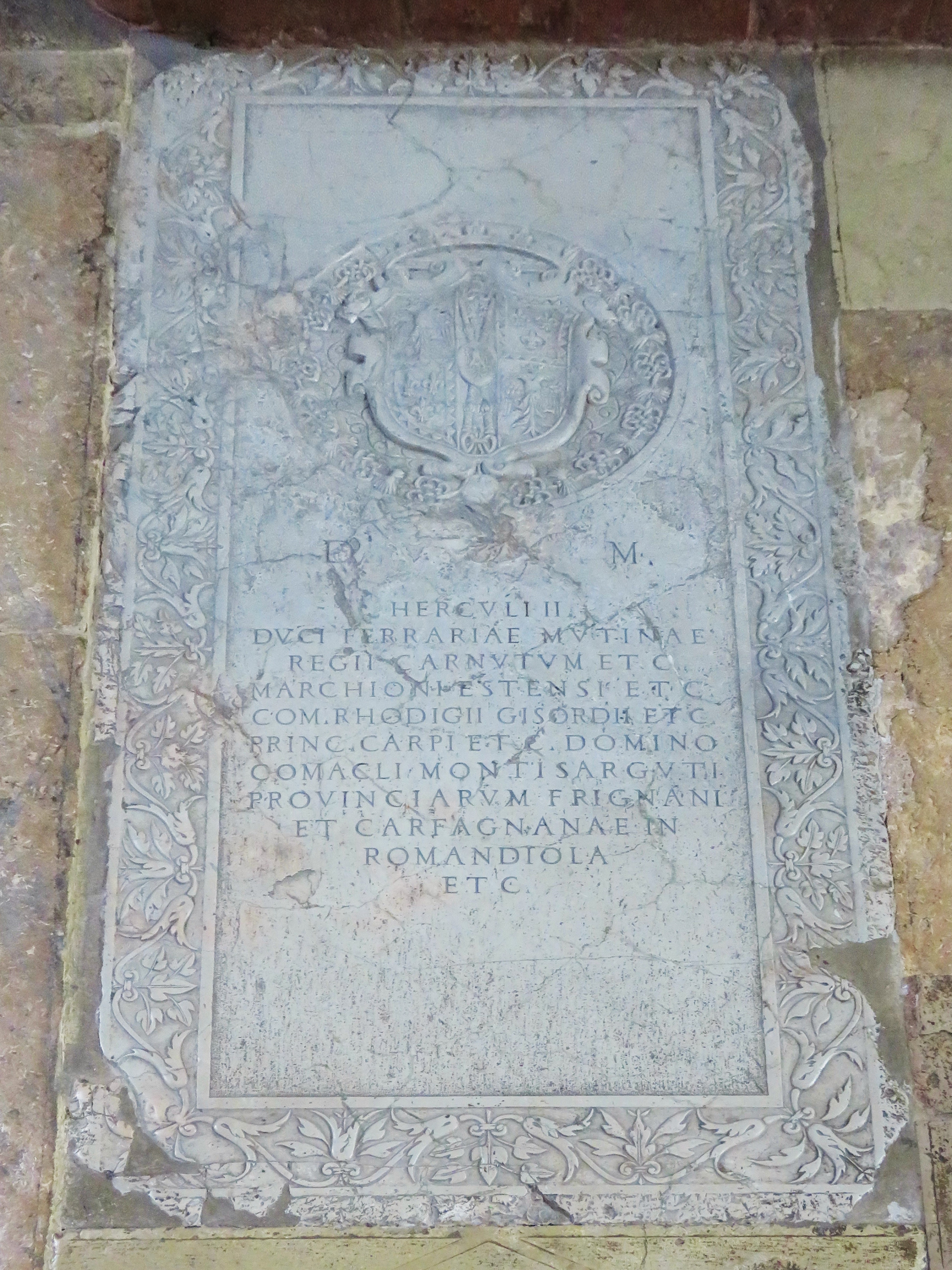 Tombe casata degli Estensi - Ercole II